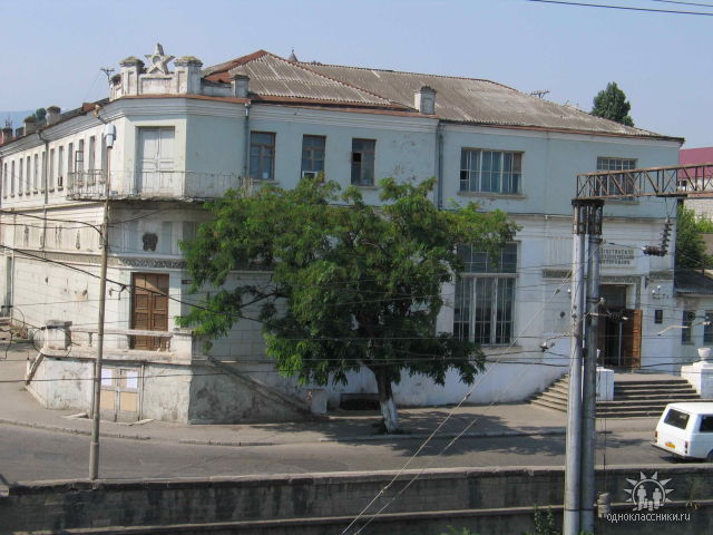 Дагестанская государственная филармония имени Т. Мурадова